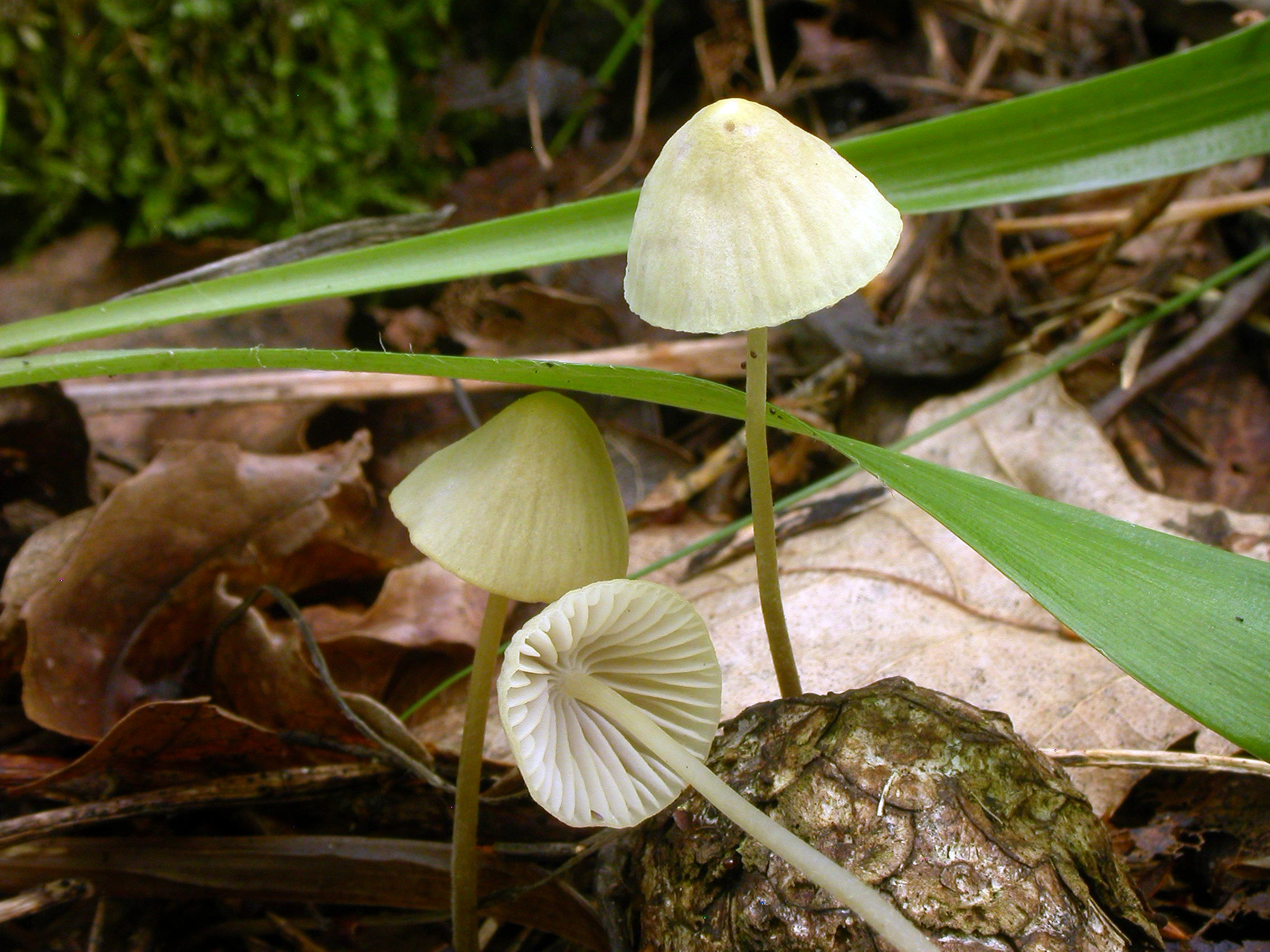 Sopparten gulhette (Mycena citrinomarginata)